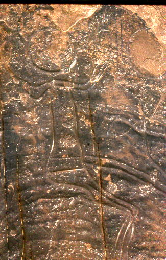 Gravure préhistorique de Ben Srour, Wilaya de M'Sila, Algérie